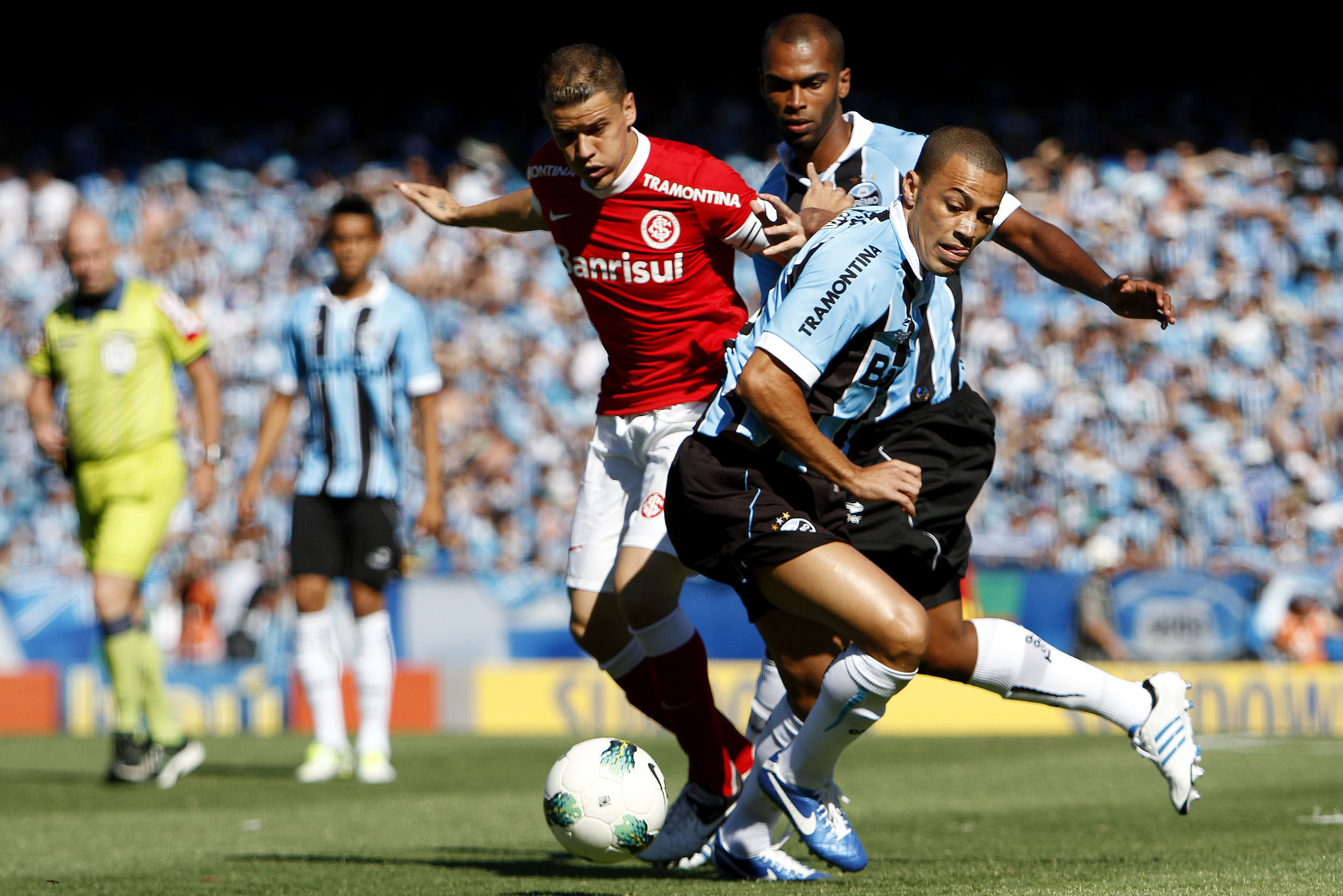 PORTO ALEGRE, RS - FUTEBOL - 02.12.2012 - D'Alessandro, cercado por Leo Gago (F) e Naldo, durante a partida entre Grêmio e Internacional pela última (38ª) rodada do Brasileirão 2012, na tarde desde domingo, no Estádio Olímpico Monumental. Foto: Guilherme Testa